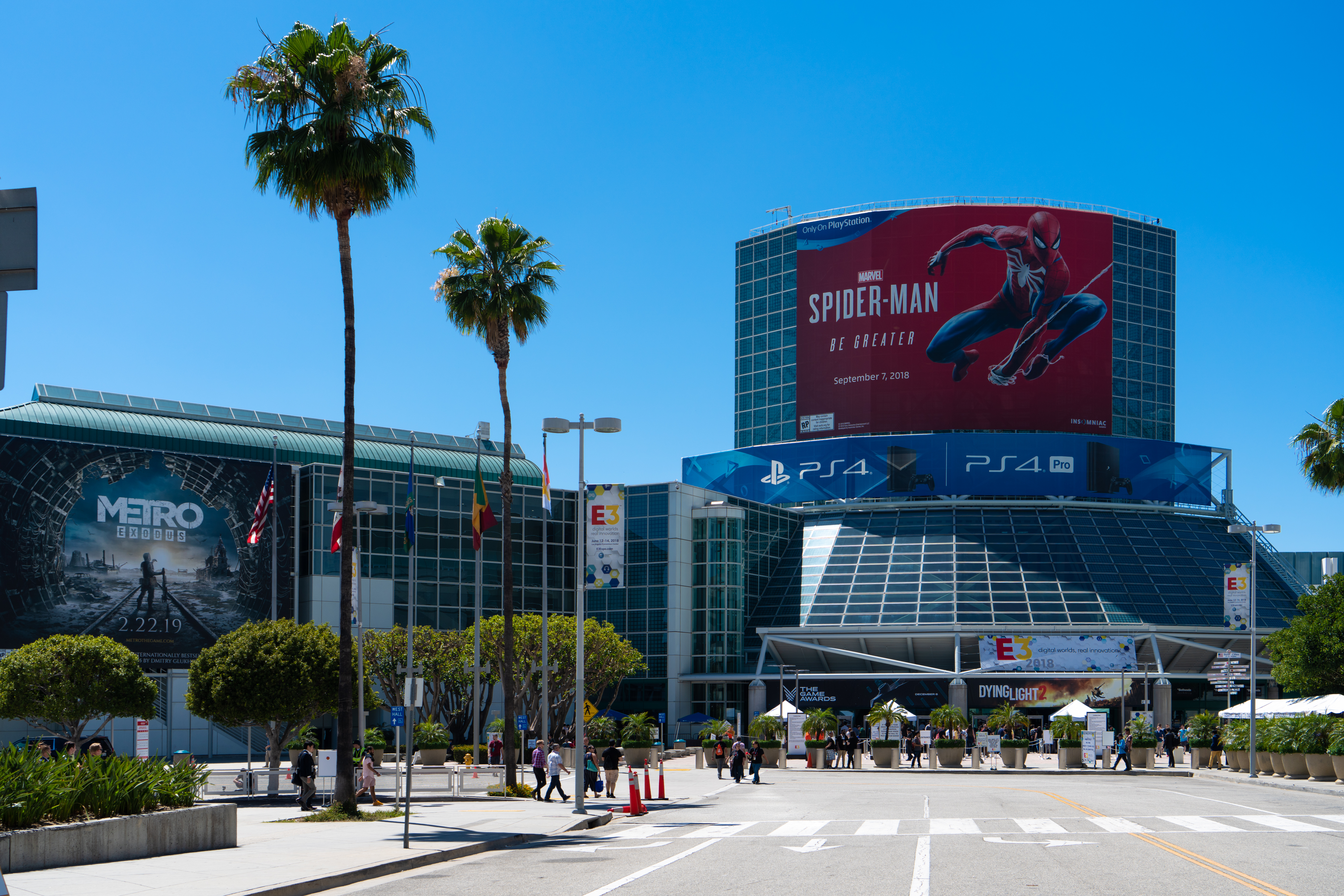 E3 2018